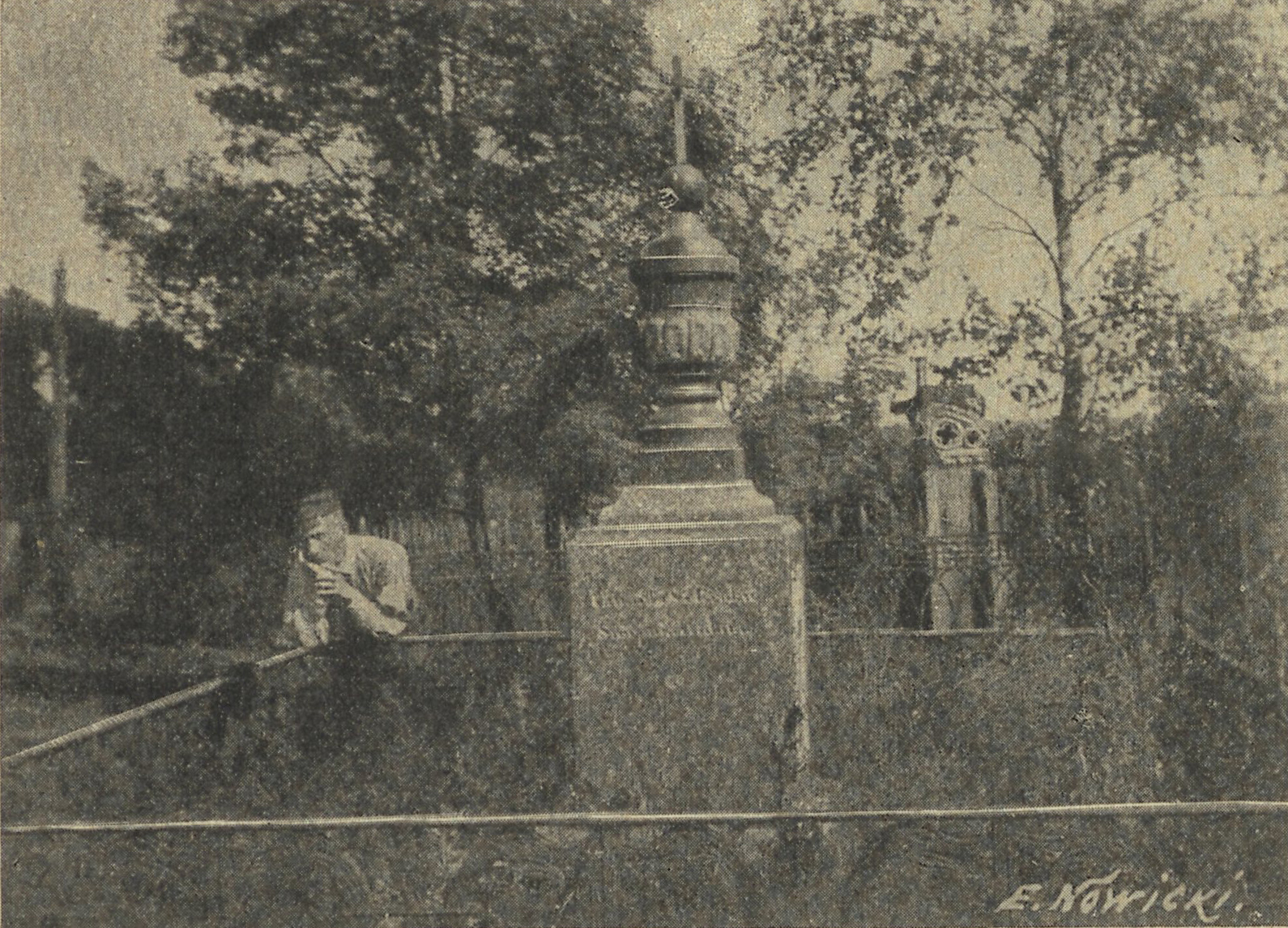 Беларуская (тарашкевіца): Ротніца (Rotnica). Надмагільле Яна Чачота (Jan Čačot)